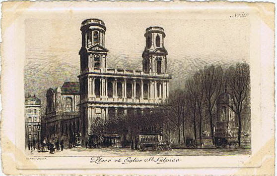 Eglise et Place St Sulpice à Paris. Carte Postale à l'au-forte de Ch. PINET.